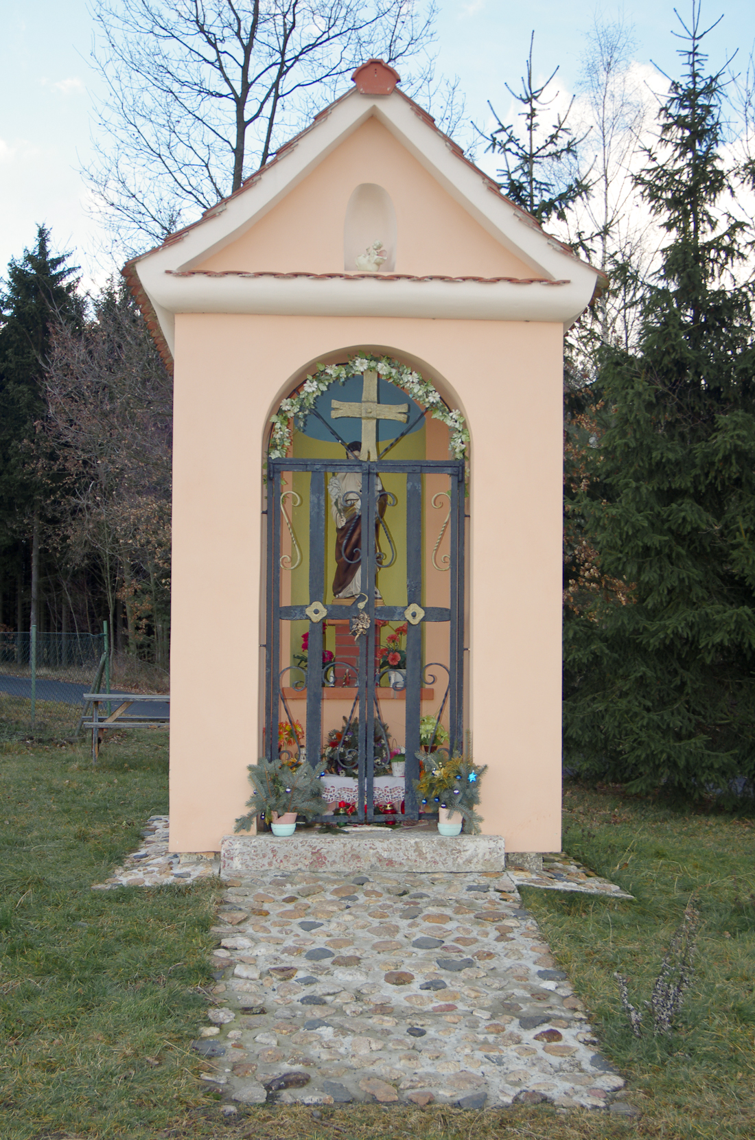 Josefov, okres Sokolov, kaplička u polní cesty do Radvanova, na JZ okraji obce